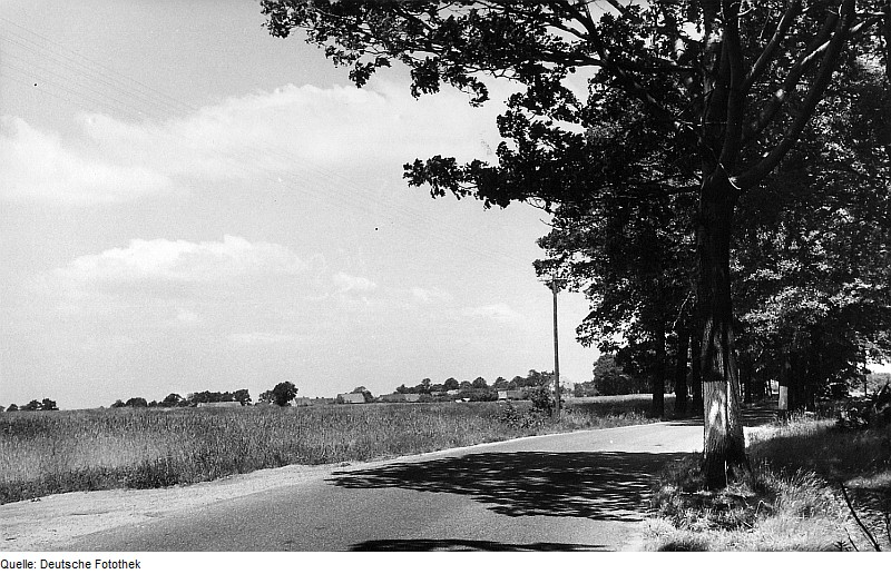 Original image description from the Deutsche Fotothek Nieder-Neundorf. Blick auf das Dorf, links von der Straße vor dem Dorf Flurstück "auf der Windmühle"